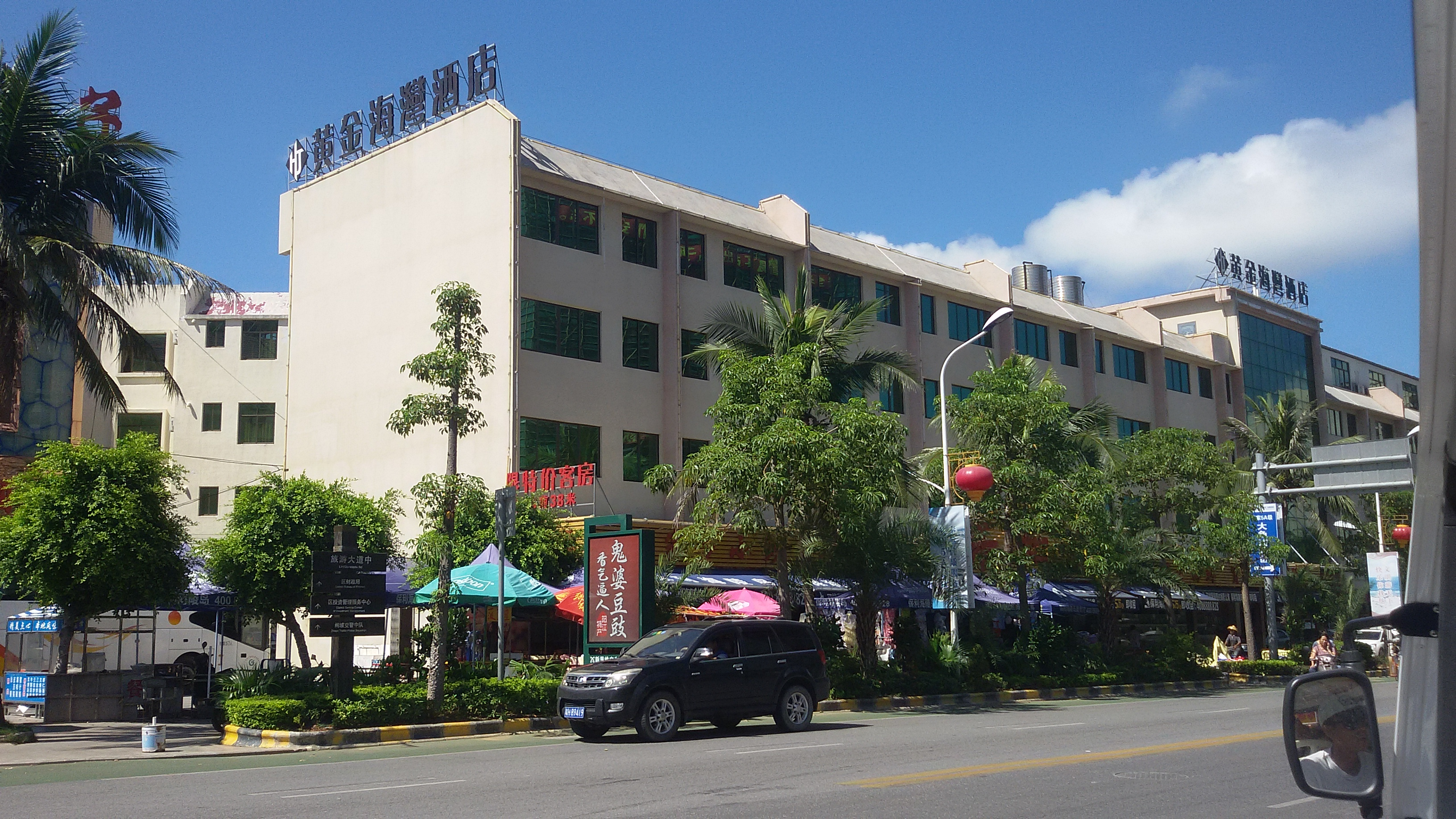 粵語: 黃金海灣假日酒店